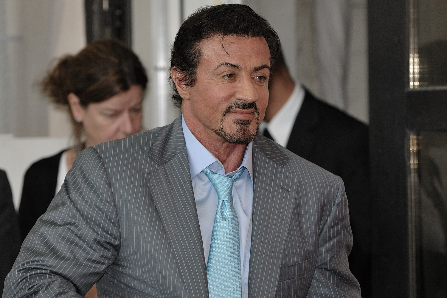 66ème Festival du Cinéma de Venise (Mostra), 11ème jour (12/09/2009) Tapis rouge avec Sylvester Stallone, SLY ! L'acteur et réalisateur américain : Sylvester Stallone a reçu le prix : Vive le cinéaste, de la Mostra du cinéma de Venise.